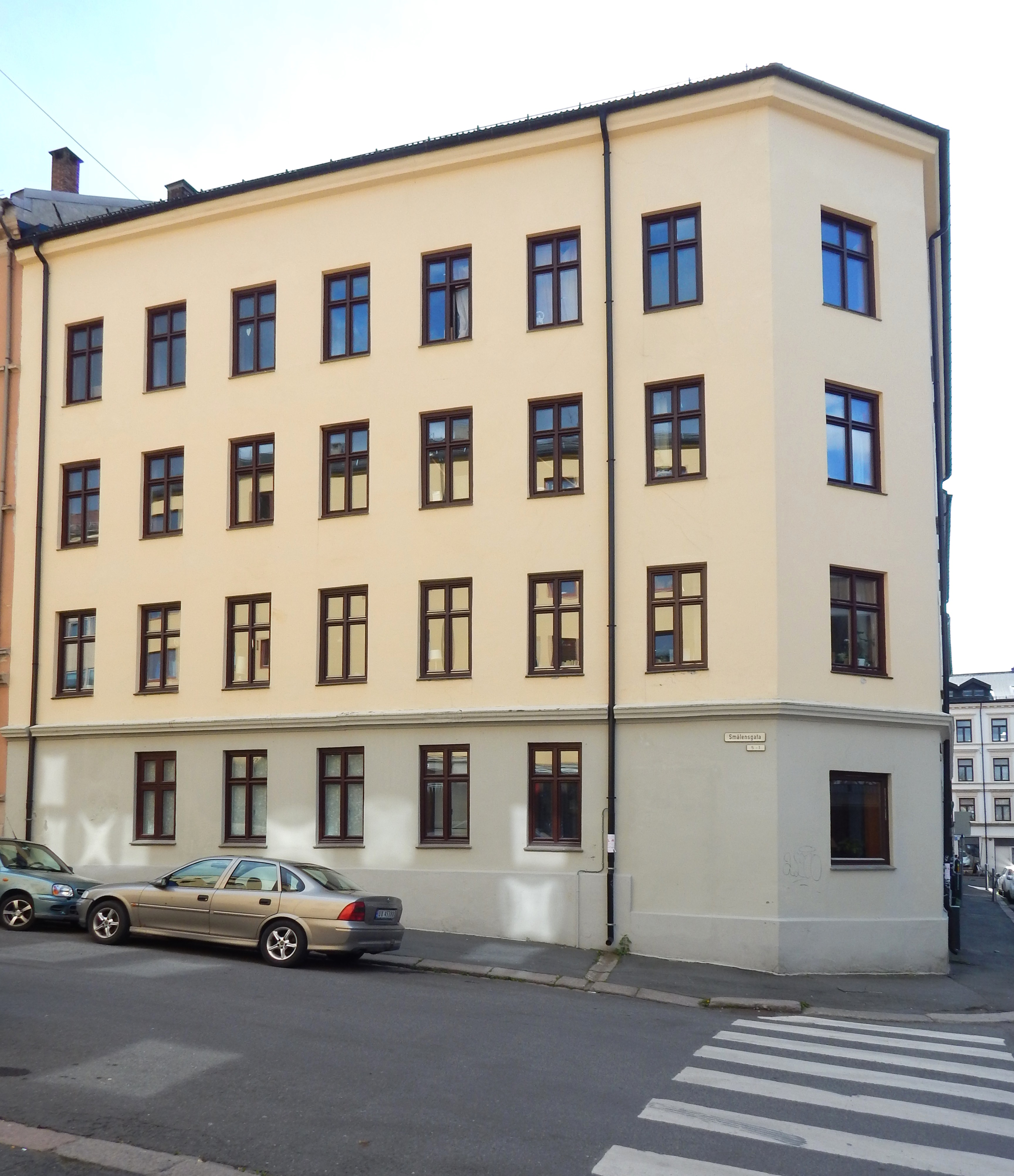 Smålensgata